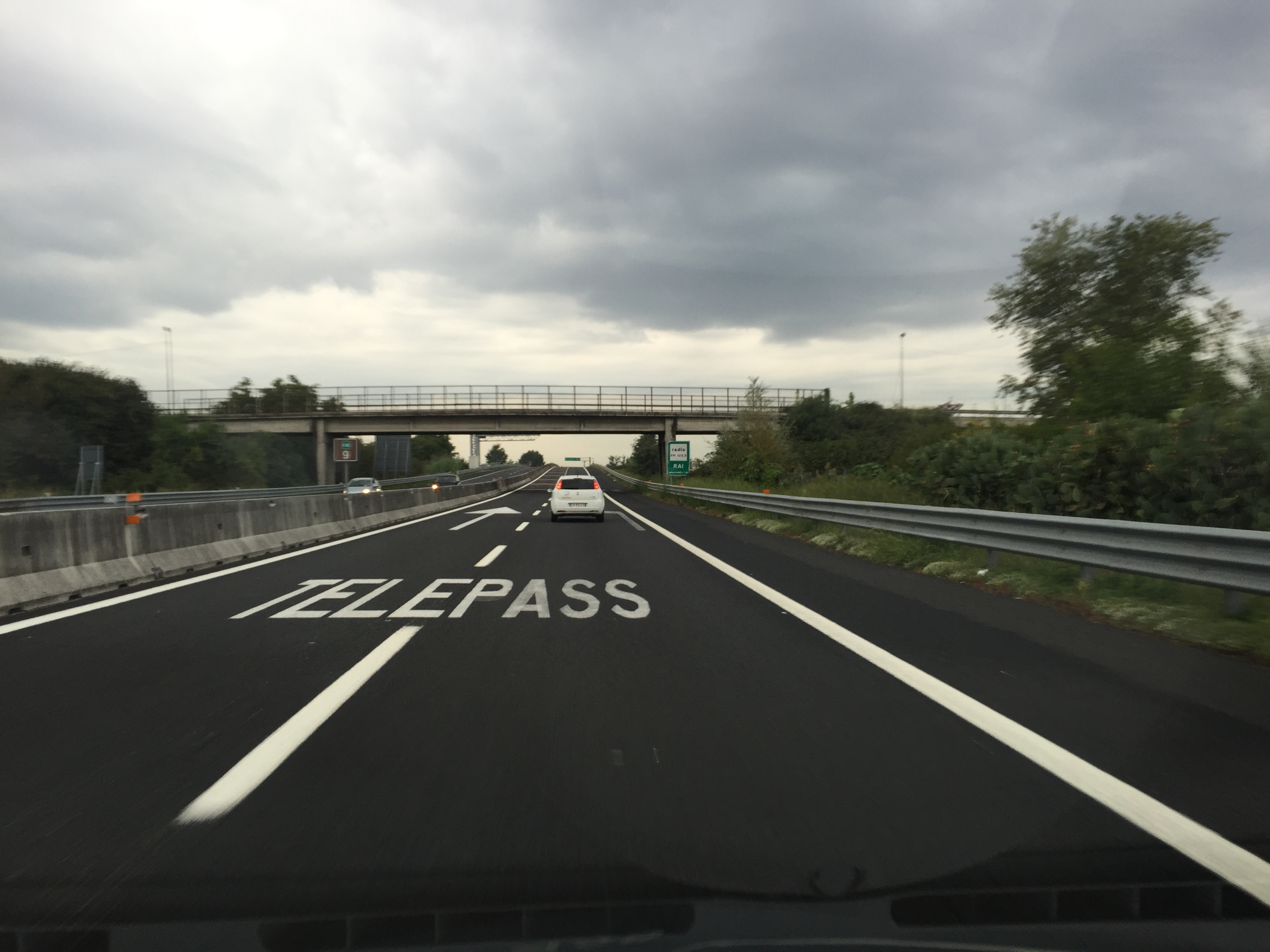 Segnaletica orizzontale di presegnalamento della corsia riservata Telepass sull'autostrada A16 all'altezza della barriera di Napoli